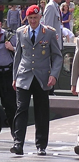 Schlacht bei Minden, Europbrücke zum 250 jährigen Jubiläum. Generalmajor Markus Kneip (mit roter Kopfbedeckung) beim Übergang über die Weser anlässslich des Jubiläums der Schlacht bei Minden zusammen mit Ehrengästen, u.a. Generalmajor Mungo Melvin, Kommandeur des United Kingdom Support Command Deutschland.